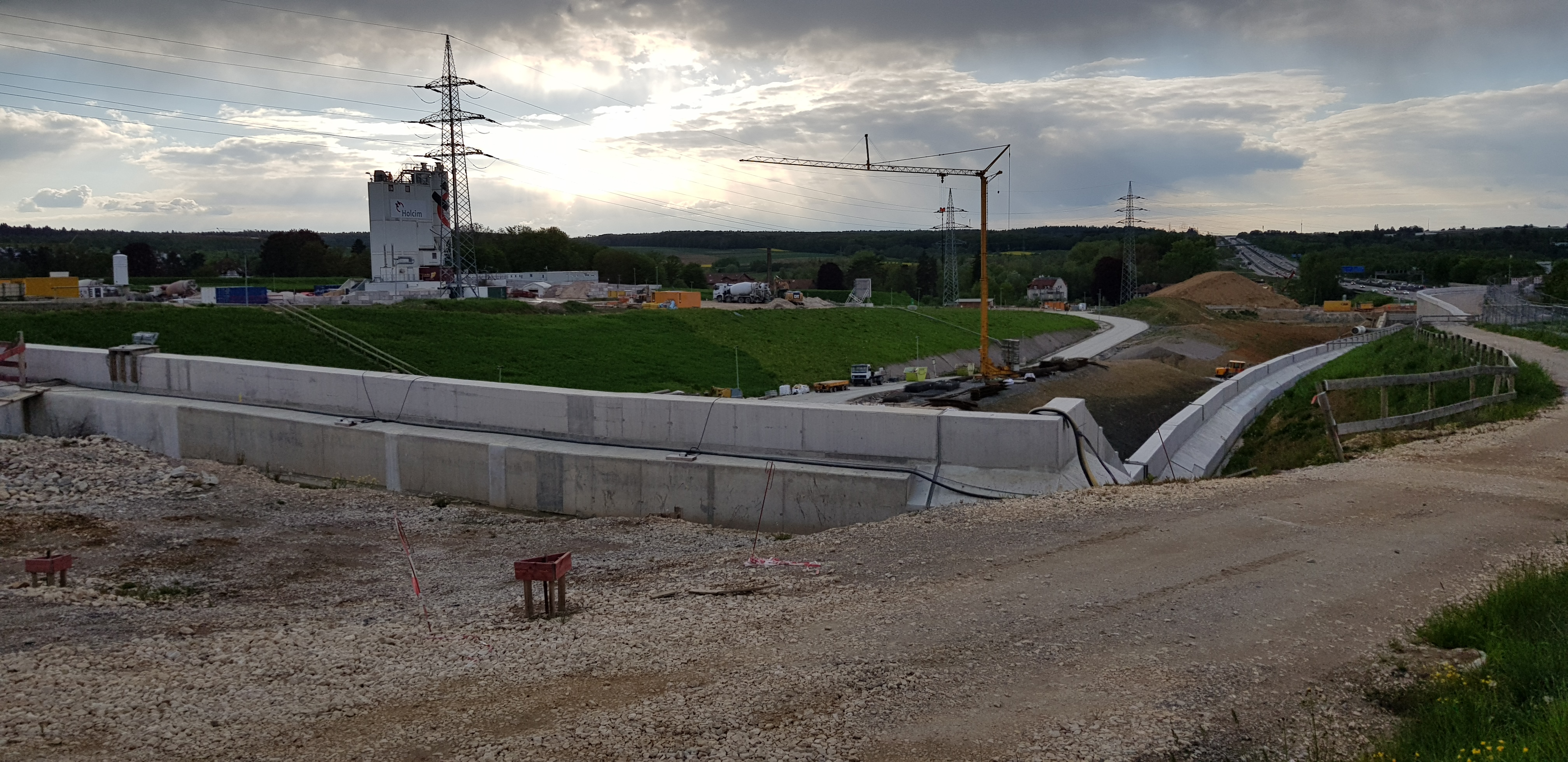 Blick vom Westportal des im Bau befindlichen Albvorlandtunnels im Mai 2019: Am Horizont ist die weitere Strecke Richtung Stuttgart (Teil von Stuttgart 21) zu erkennen, rechts (entlang der Stützwand) wird die Güterzuganbindung Richtung Wendlingen ausgefädelt.